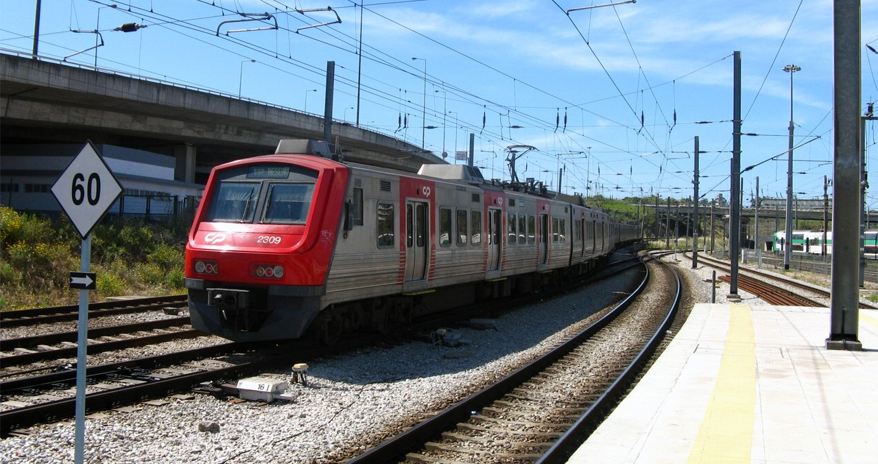 UQE 2309 em manobras em Campolide